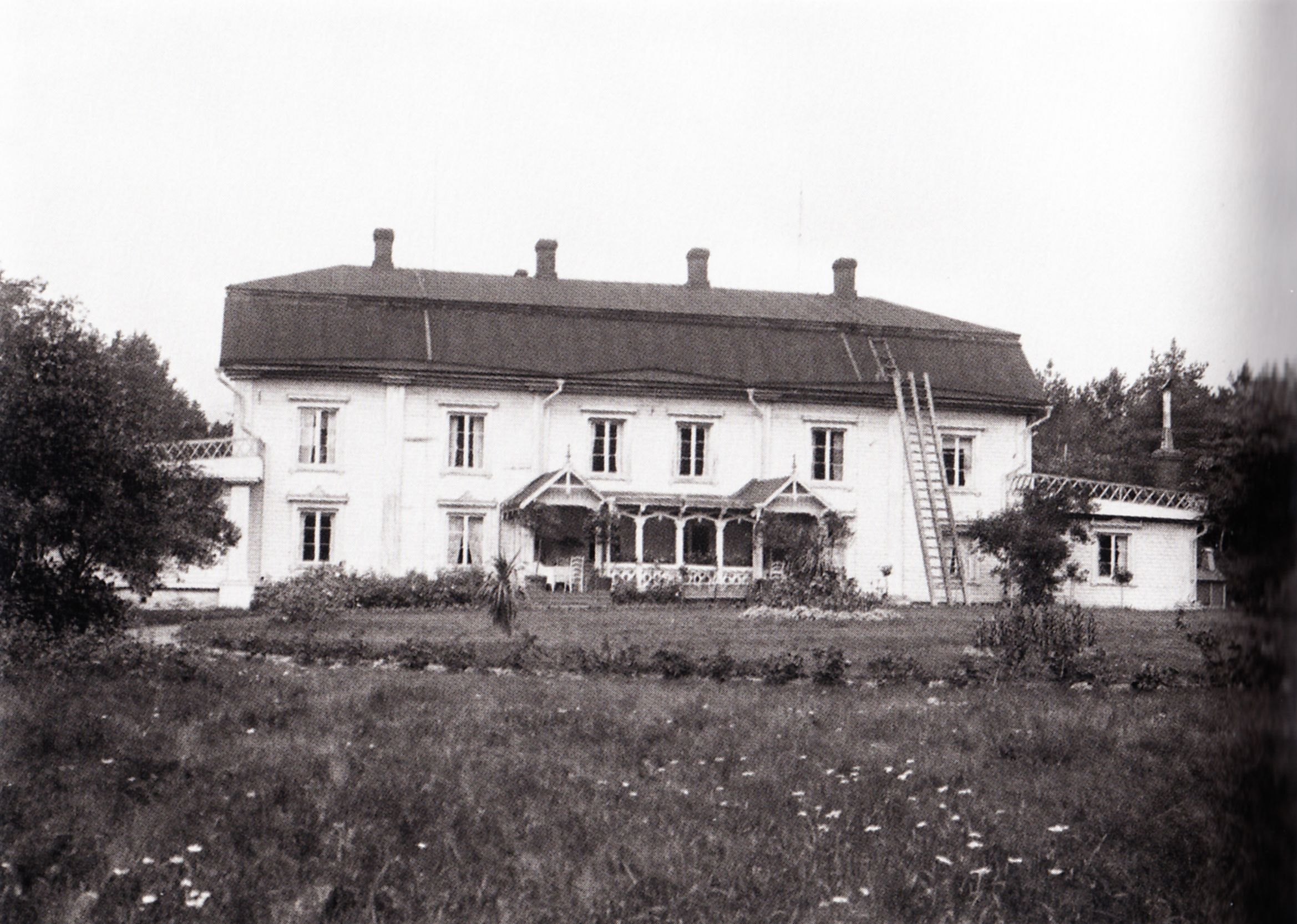 Honkolan kartano